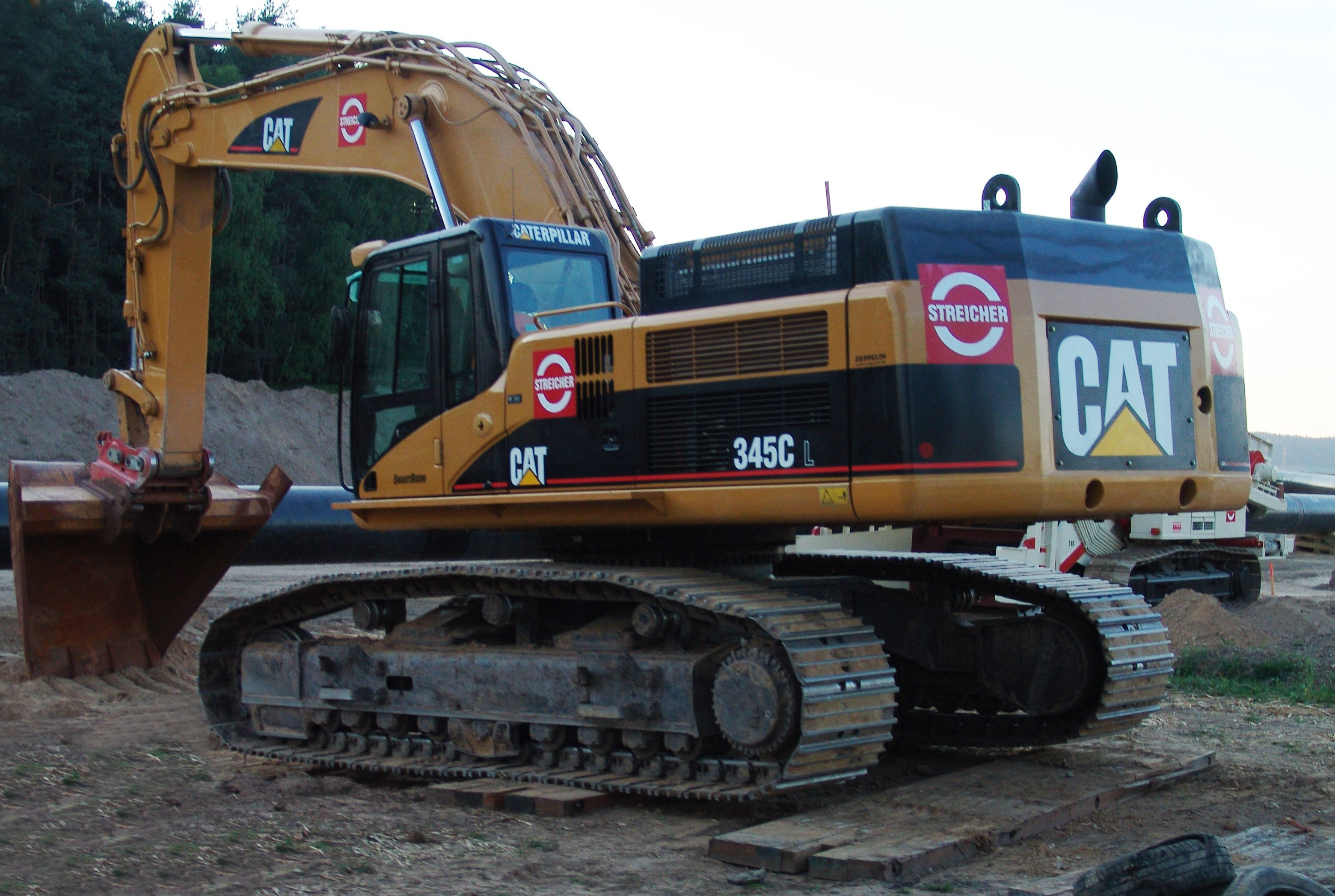 Caterpillar 345C L